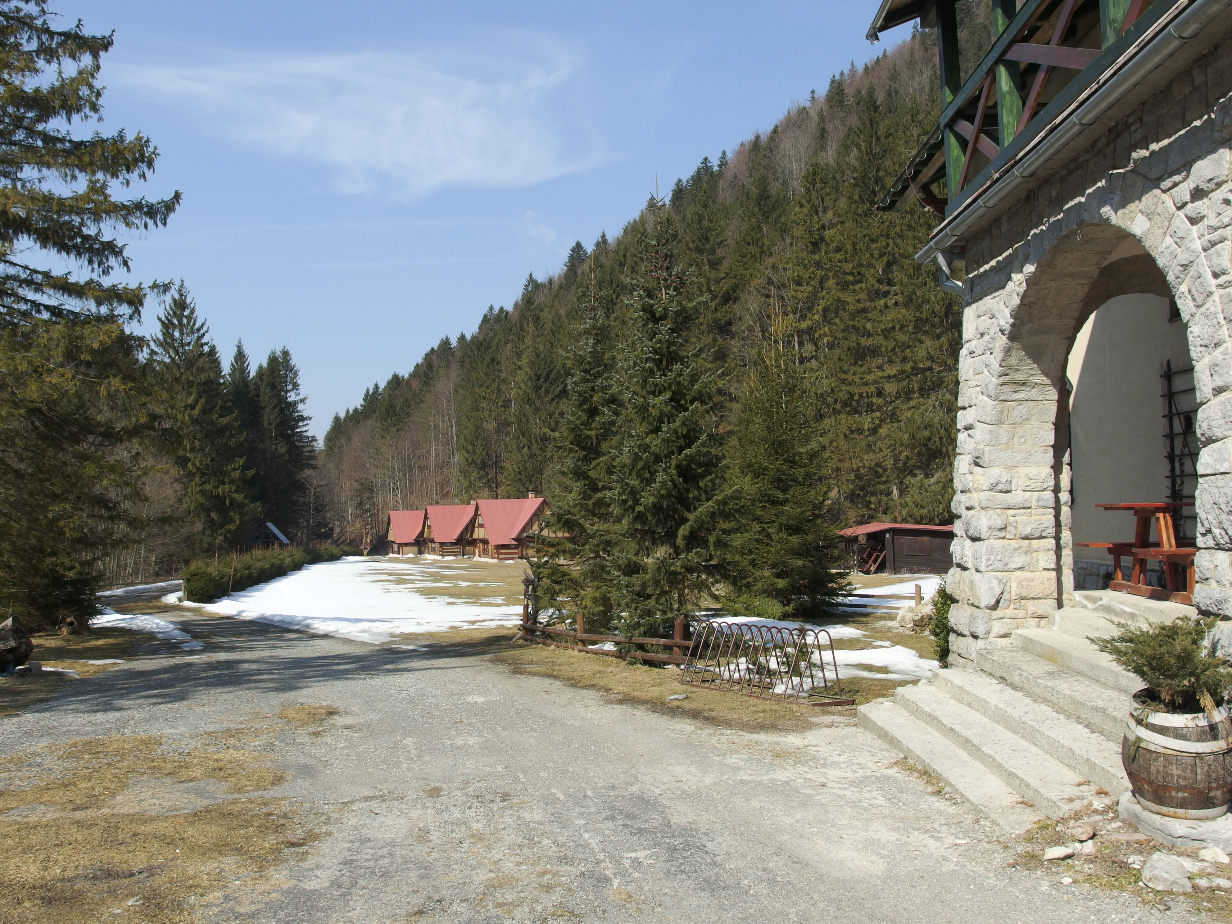 Koniec zimy pri chate Havranovo